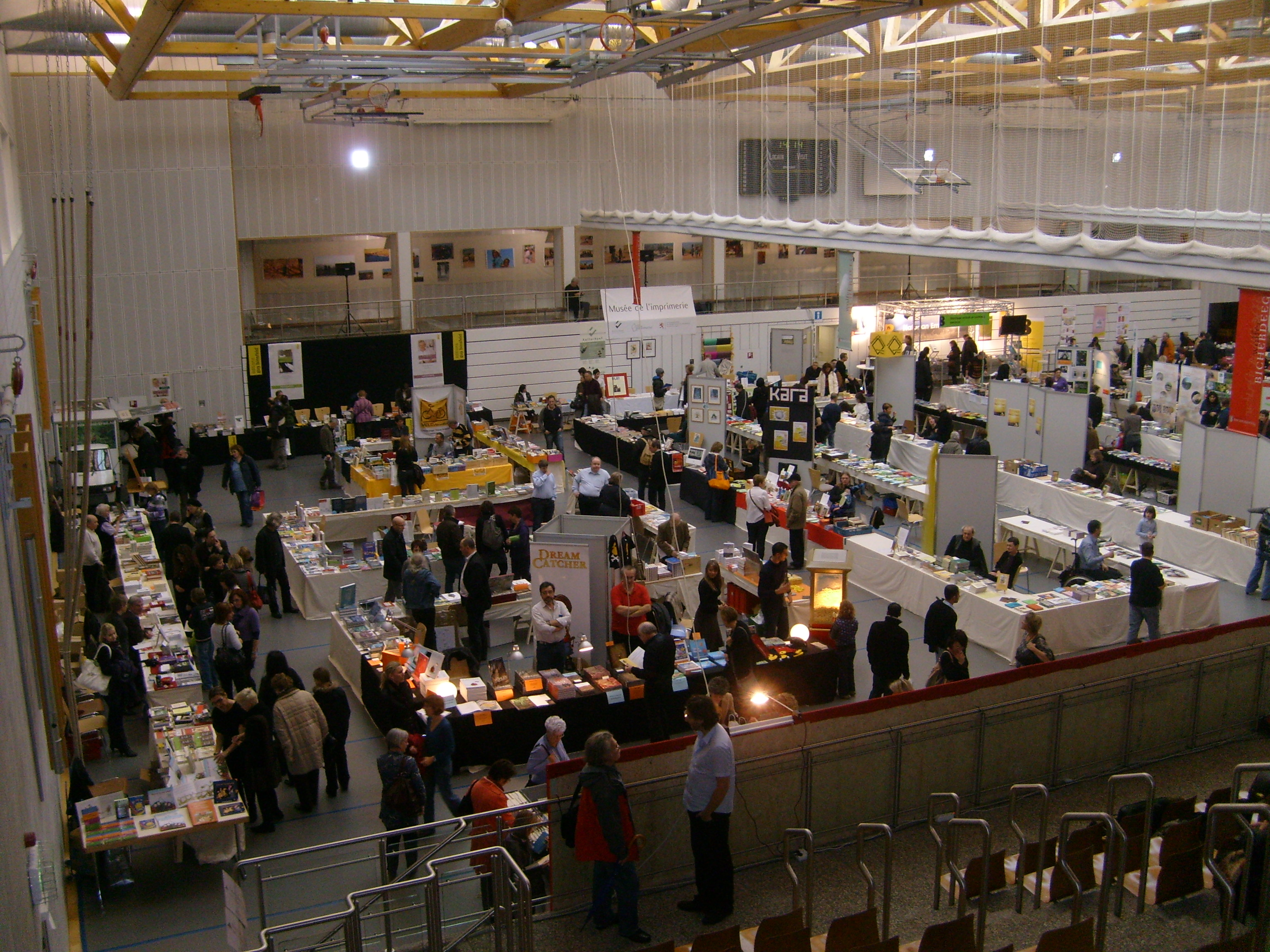 Walfer Bicherdeeg: Stänn an der Sportshal vum Centre sportif Prince-Henri.